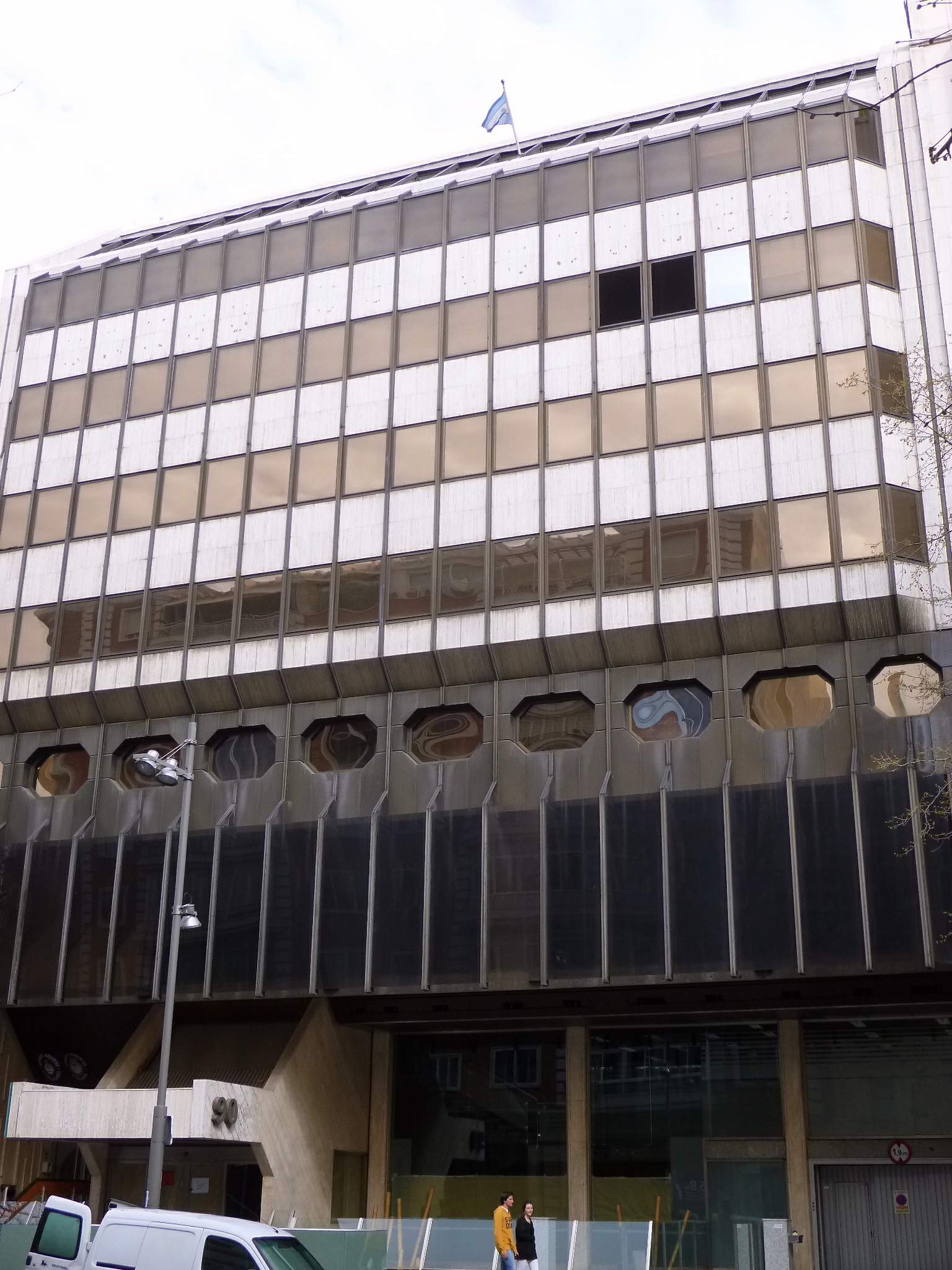 Embajada de Argentina en España (Madrid, calle de Serrano, 90)